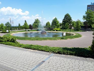 Fontanna